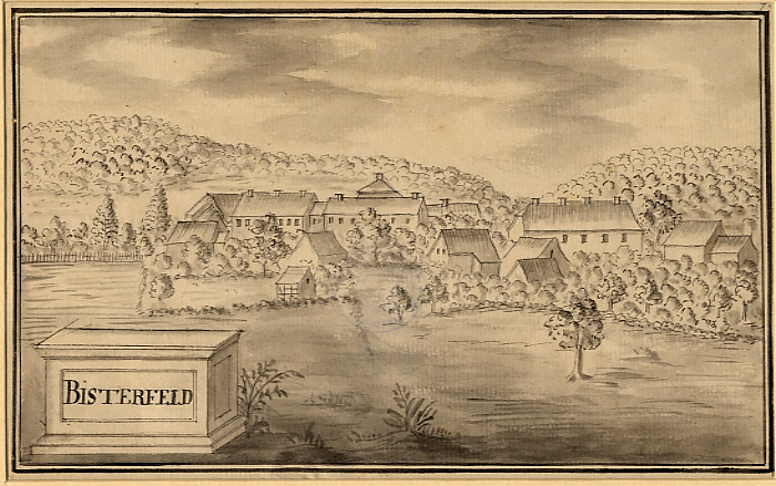 Biesterfeld